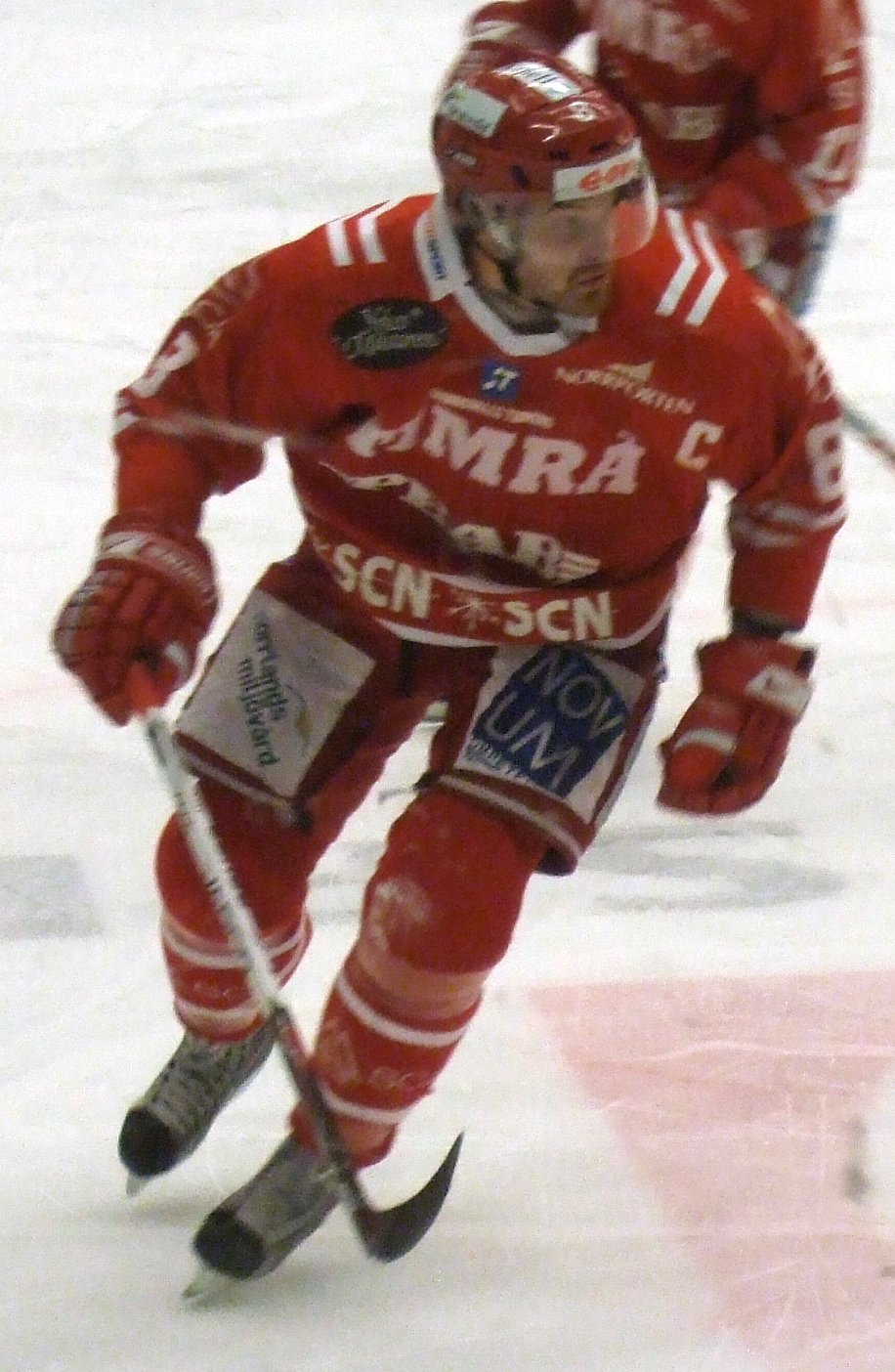 Ice hockey player Sanny Lindström of Timrå IK in E.ON Arena, Timrå, Sweden